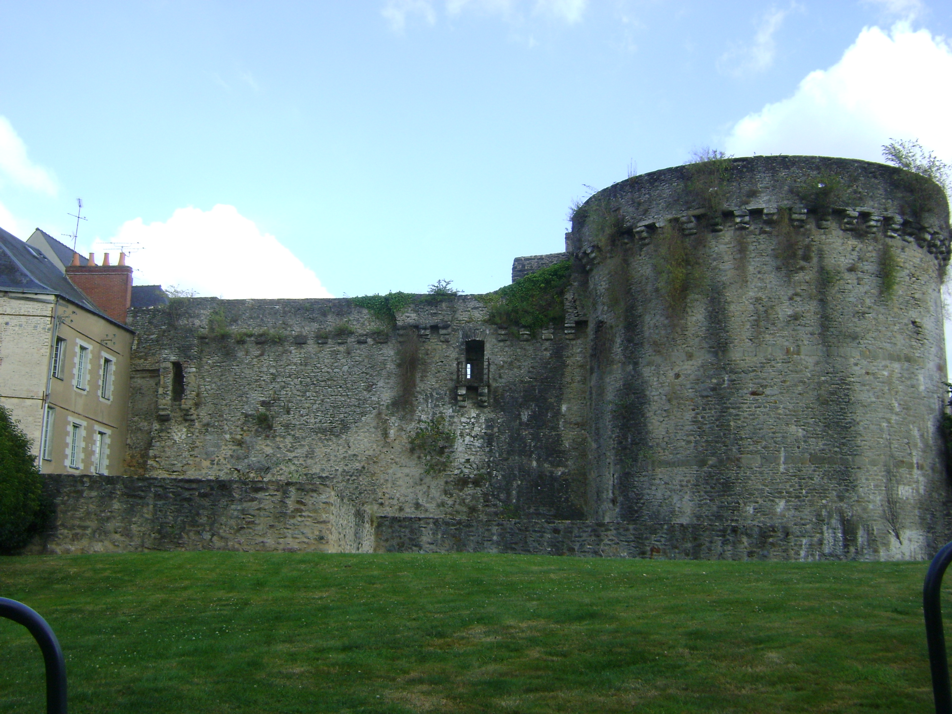 Les anciens remparts de Laval, Mayenne. Remparts Nord-Ouest et la Tour Rennaise. This building is en partie classé, en partie inscrit au titre des Monuments Historiques. .